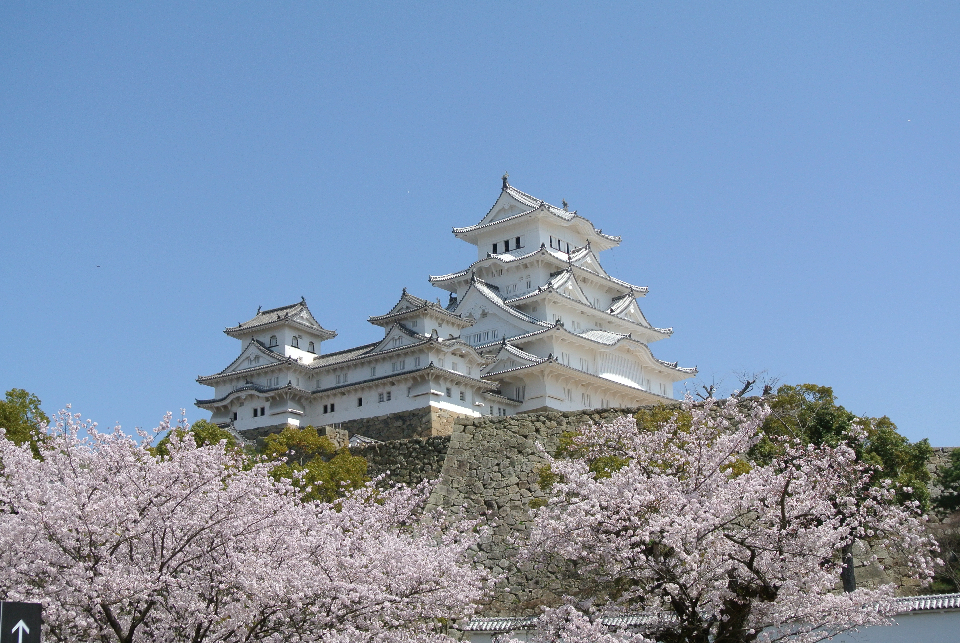 Замок Химэдзи с вишни с юго-запада